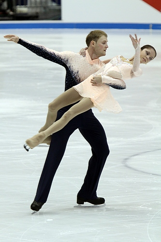 2010 NHK Trophy - Vera Bazarova and Yuri Larionov